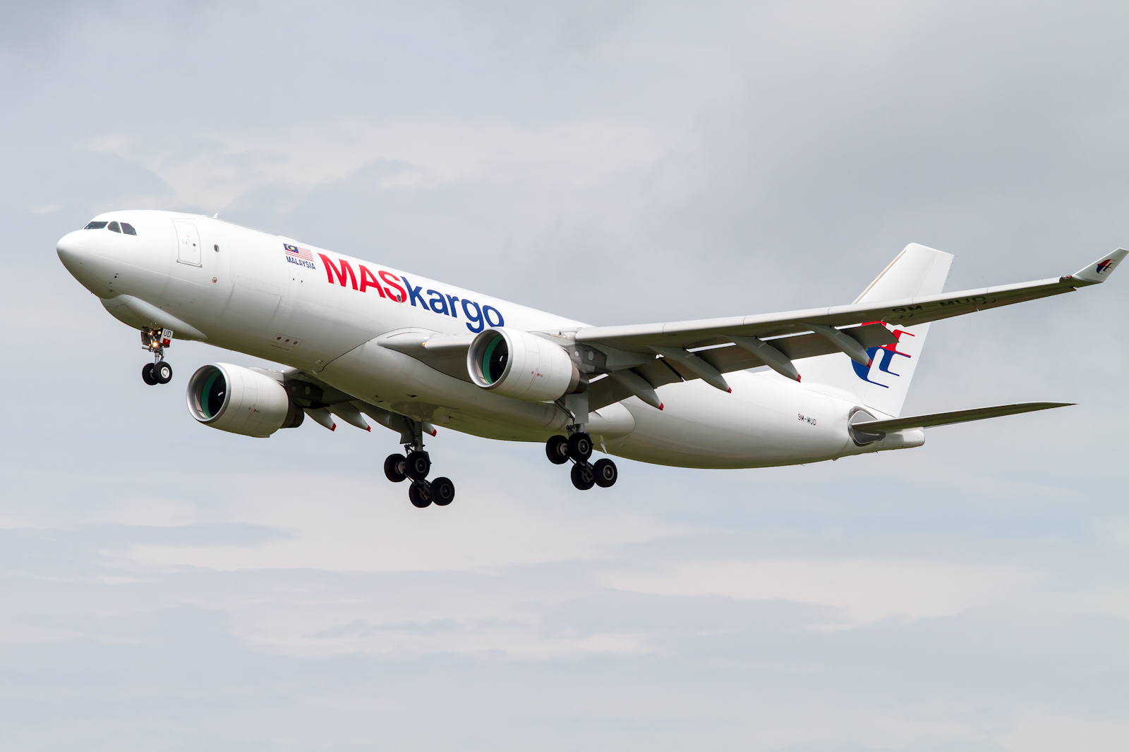 Aircraft: Airbus A330-223F 9M-MUD(cn: 1180) Airline: Malaysia Airlines Kargo(MASkargo) - MAS Headquarters: Subang, Selangor, Malaysia 15/07/2012 Tokyo-Narita Airport(NRT/RJAA), Japan